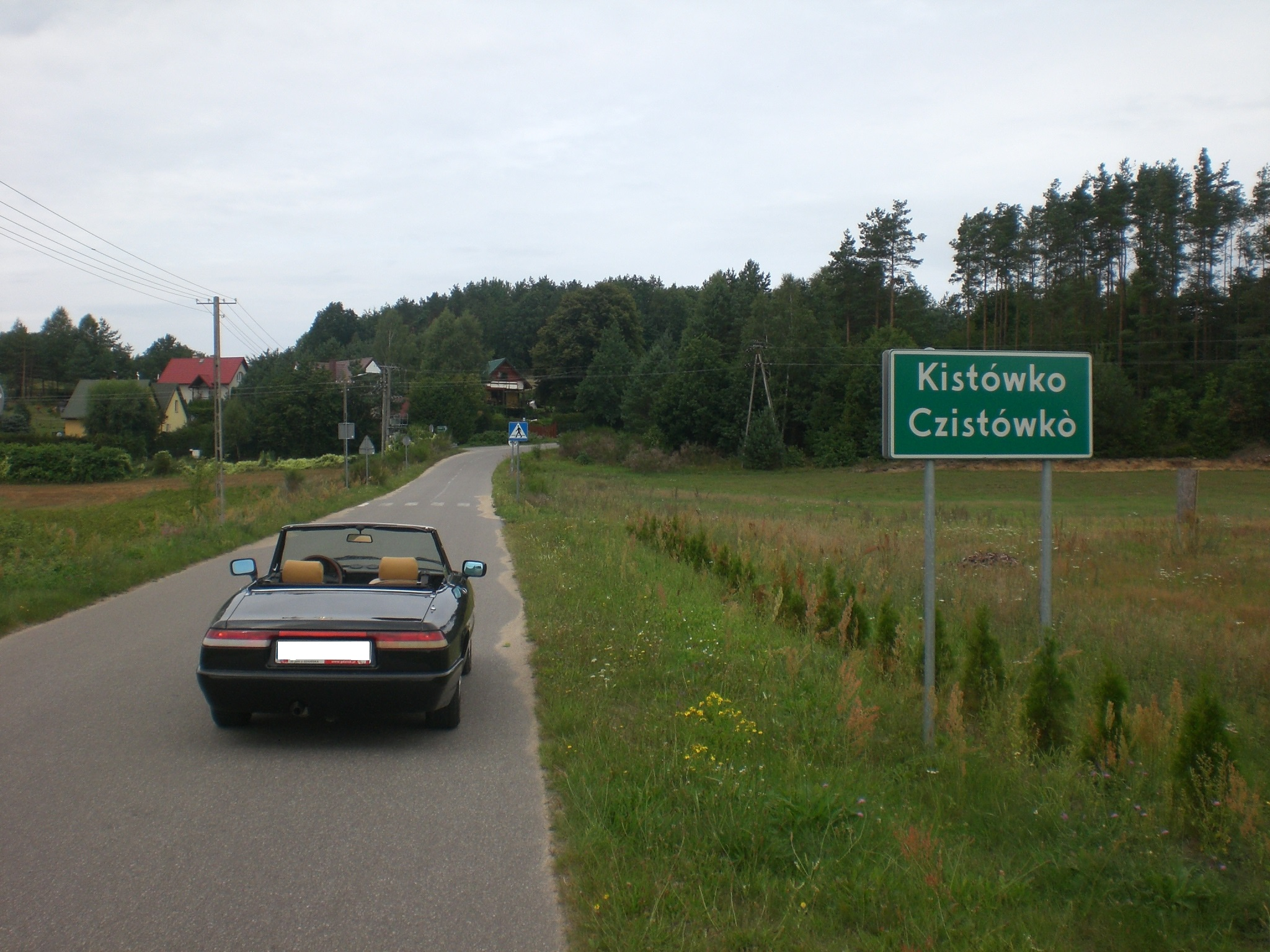 Kistówko